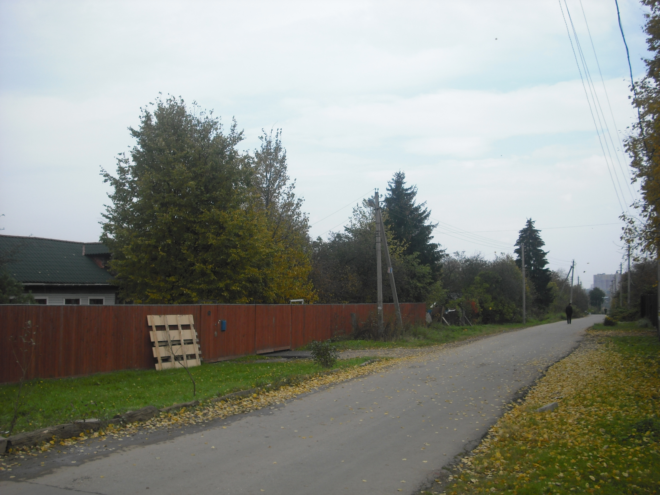 Улица Муравская в с. Рождествено (Митино, Москва)